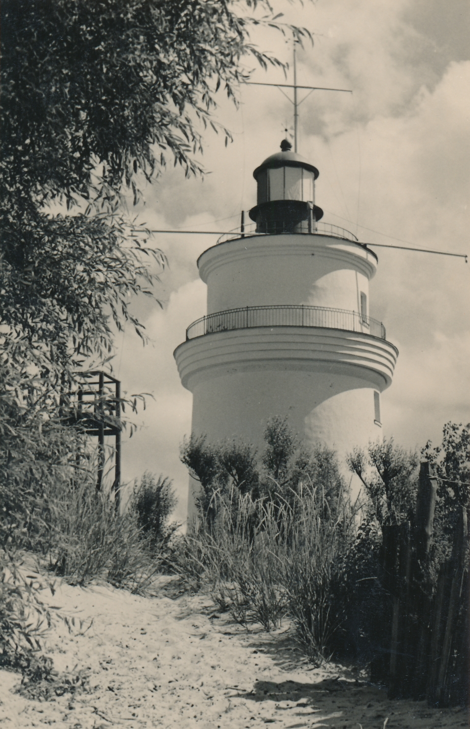 Narva-Jõesuu vana tuletorn, ehitatud 1808. Hävines II maailmasõja ajal